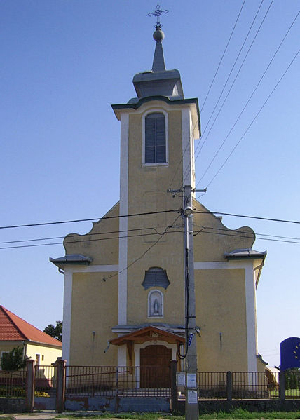 A balkányi Magyarok Nagyasszonya római katolikus templom